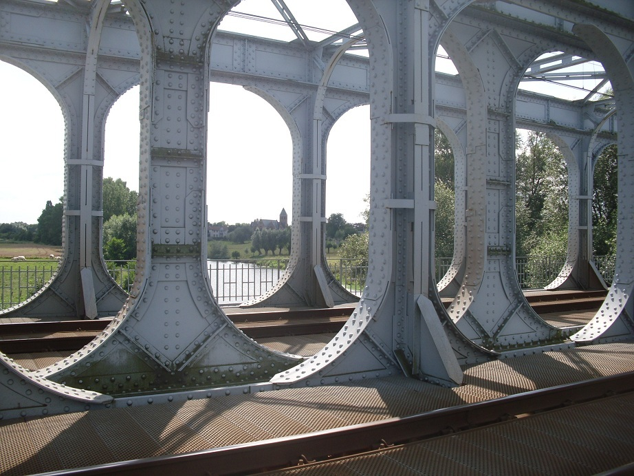 Vierendeelbrug (spoorwegbrug) over de Leie - met kerk van Grammene - Deinze - Oost-Vlaanderen - België